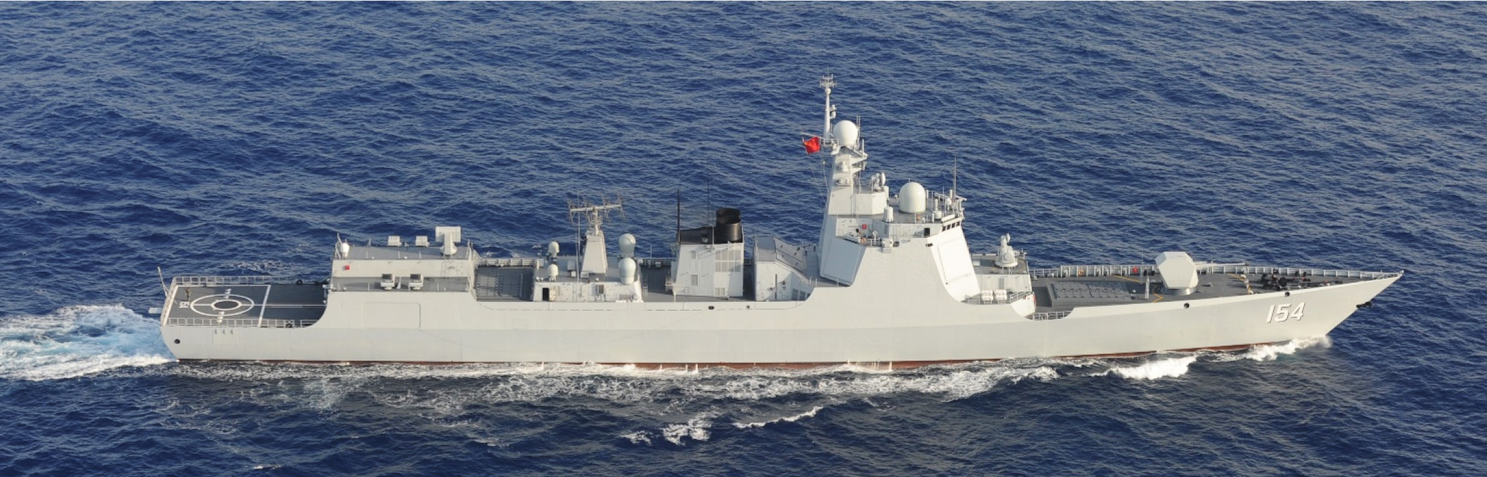 ４月２０日（金）午前１０時半頃、海上自衛隊第１３護衛隊所属「さわぎり」（佐世保）、第５護衛隊所属「あきづき」（佐世保）及び第５航空群所属Ｐ－３Ｃ（那覇）が、与那国島（沖縄県）の南約３５０ｋｍの海域を東進する中国海軍クズネツォフ級空母「遼寧」１隻、ルーヤンⅢ級ミサイル駆逐艦１隻、ルーヤンⅡ級ミサイル駆逐艦３隻、ジャンカイⅡ級フリゲート２隻の計７隻を確認した。 また、同日午前１１時頃、同海域でクズネツォフ級空母「遼寧」から複数の艦載戦闘機（推定）が飛行するのを確認した。 防衛省として、太平洋上においてクズネツォフ級空母「遼寧」から艦載戦闘機（推定）が飛行するのを確認したのは、今回が初めてである。